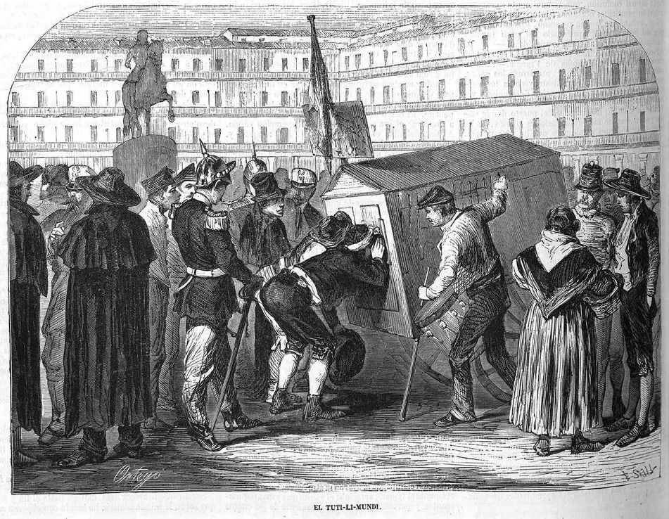 Tuti-li-mundi, en la revista española El Museo Universal.